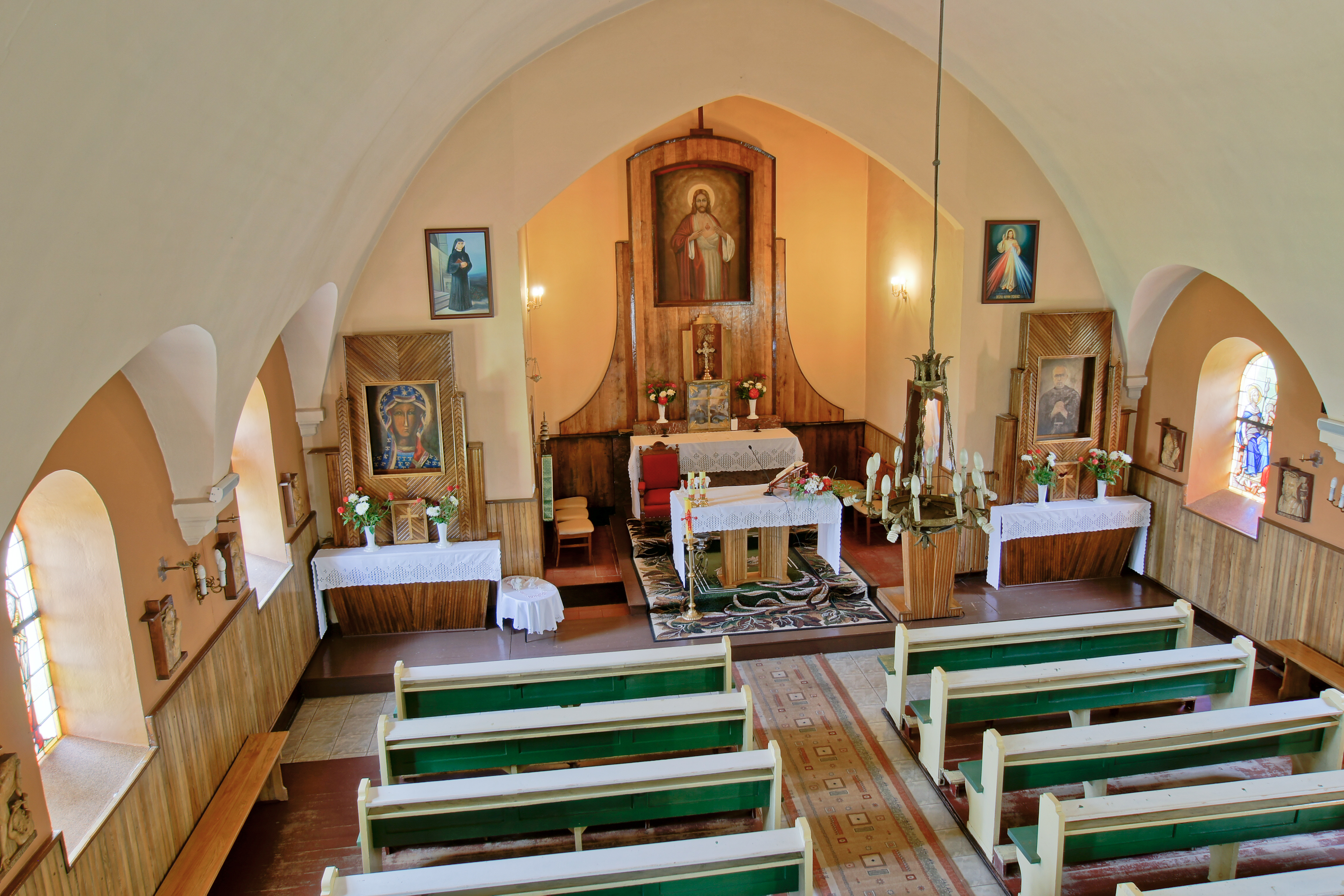 Ołtarz w prezbiterium kościóła p.w. Najświętszego Serca Pana Jezusa w Wilkowie.